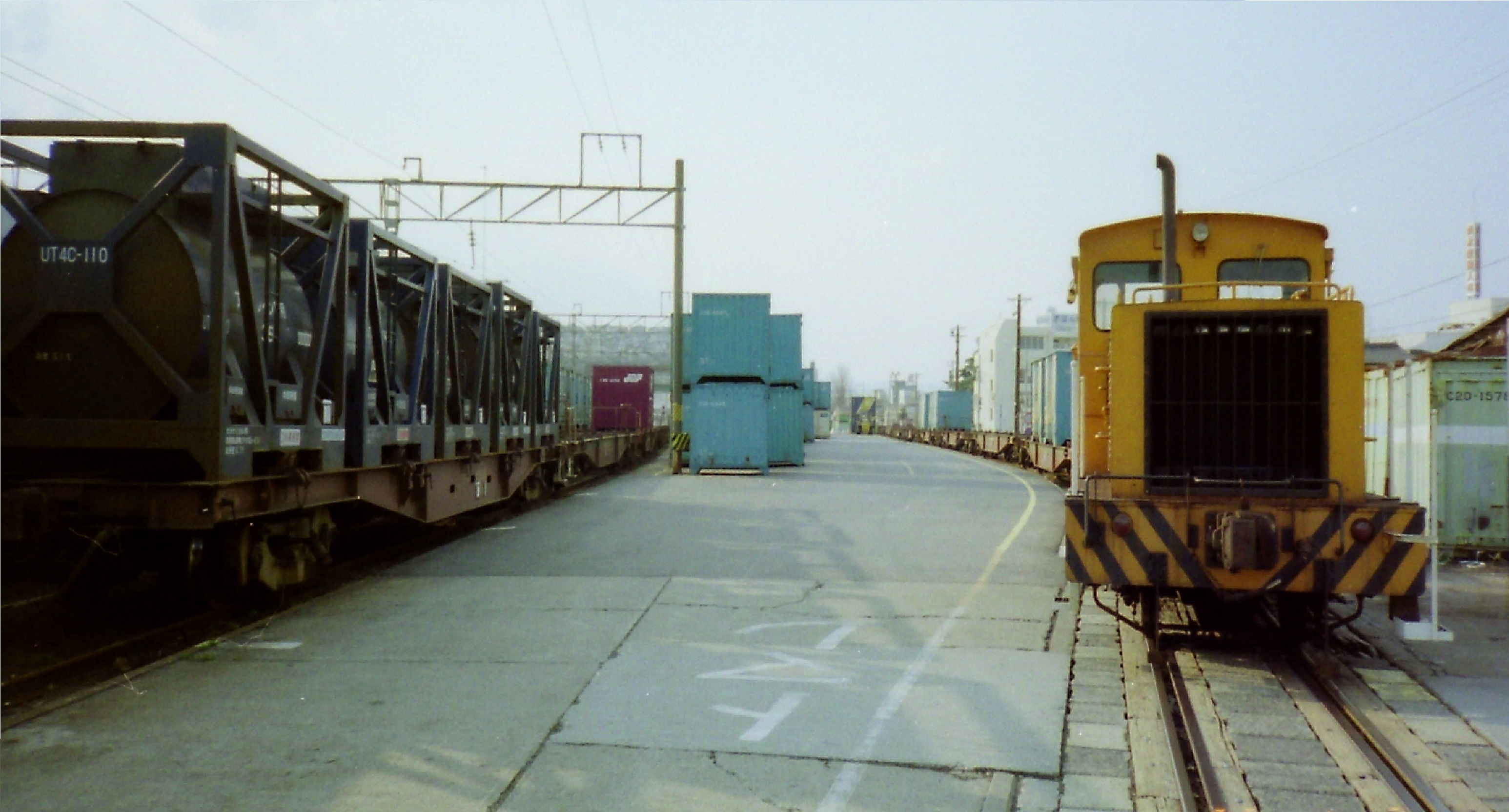 コンテナホーム敷地の東南端側 （ 鹿児島方面 ） から西大分駅舎方面 （ 福岡方面 ） を望む。 左側の貨車に乗っている5tタンクコンテナ群は、主力のアクロレイン専用。 右側の線路は、コンテナホーム北東側で短い荷役一本線の行き止まり状態になっているので、本来のコンテナ列車を二分割にして、日通の黄色いミニディーゼル機関車で入れ替えを行う。 またアクロレインのコンテナ群は、機関車手前の踏切りを渡った右側に続く、東南端側の出入り口横に留置されている。